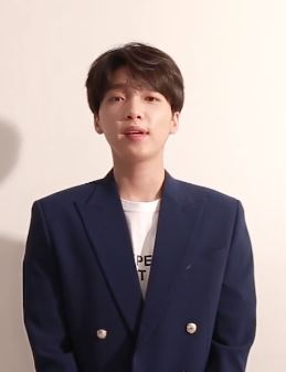 씬플레이빌 4월호는 뮤지컬 '그리스'로 처음 뮤지컬에 도전하는 배우 정세운과 함께했습니다! 씬플 독자들에게 공연 전 미리 인사를 남겨주었어요!